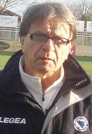 Ćiro Blažević na Orijentovom igralištu u Rijeci